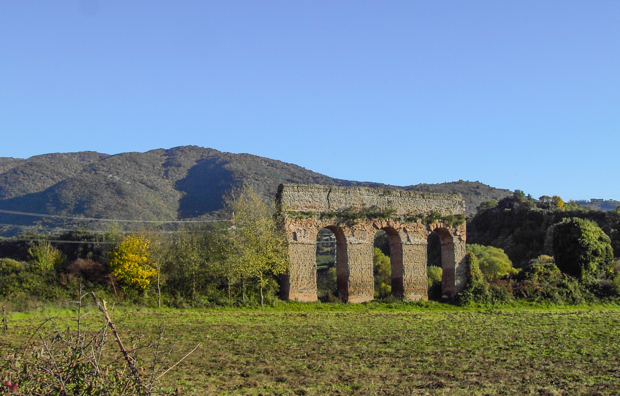 Tivoli, resti dell'acquedotto Anio Novus in località Arci